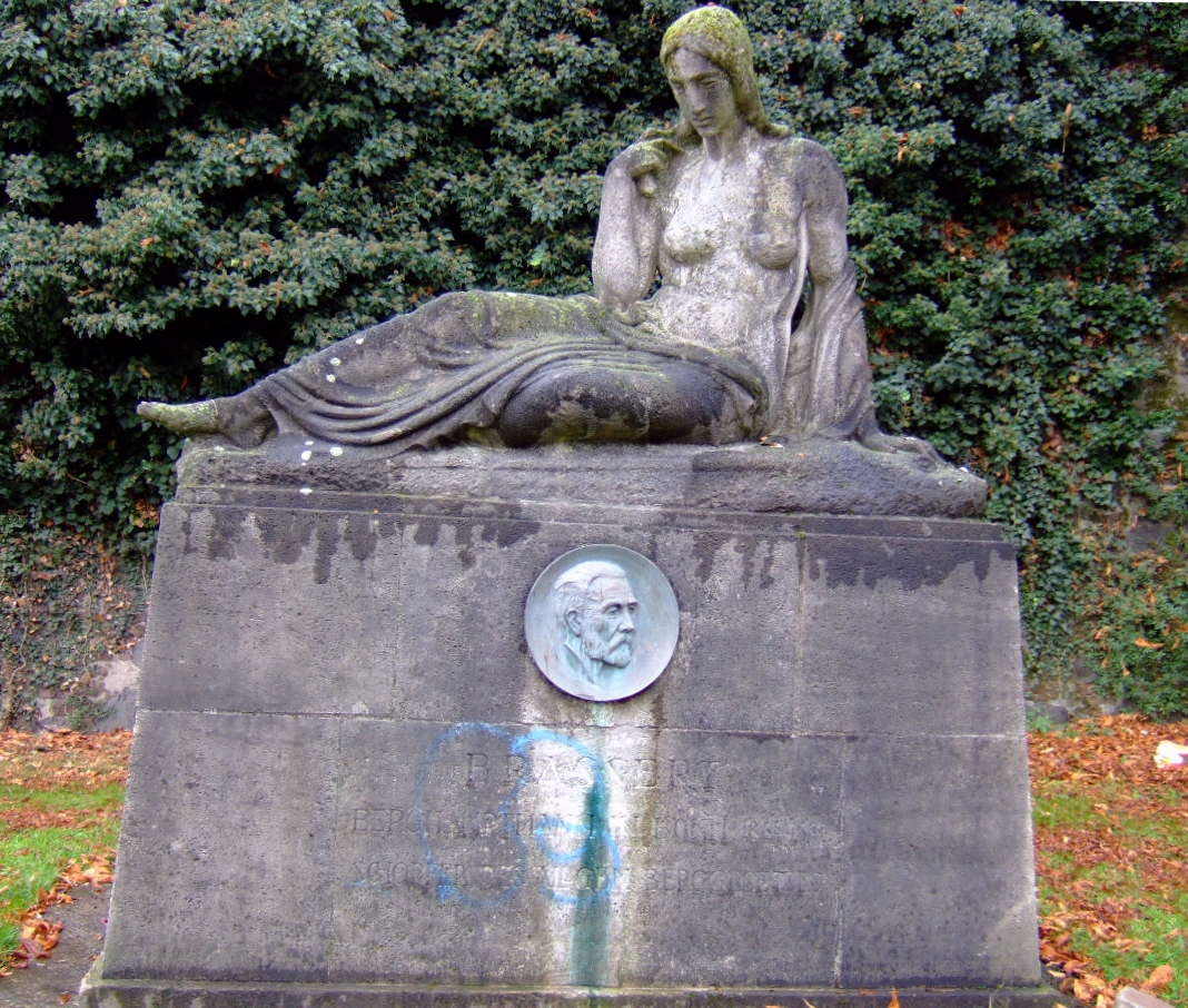 Hubert Netzer: Hermann Brassert-Denkmal - Rheinufer in Bonn („Brassertufer“)